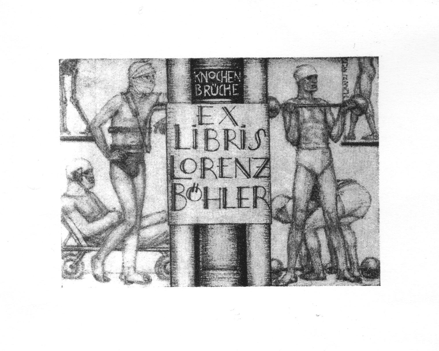 Lorenz Böhler Ex Libris